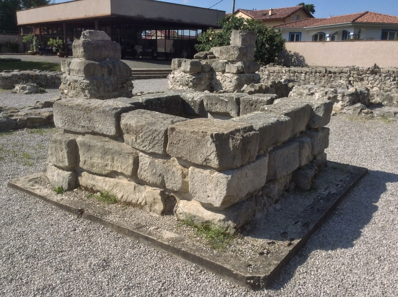 Spätrömische Brunneneinfassung des 4.Jhdt. im Burgus Gerulata, Rusovce (SK).